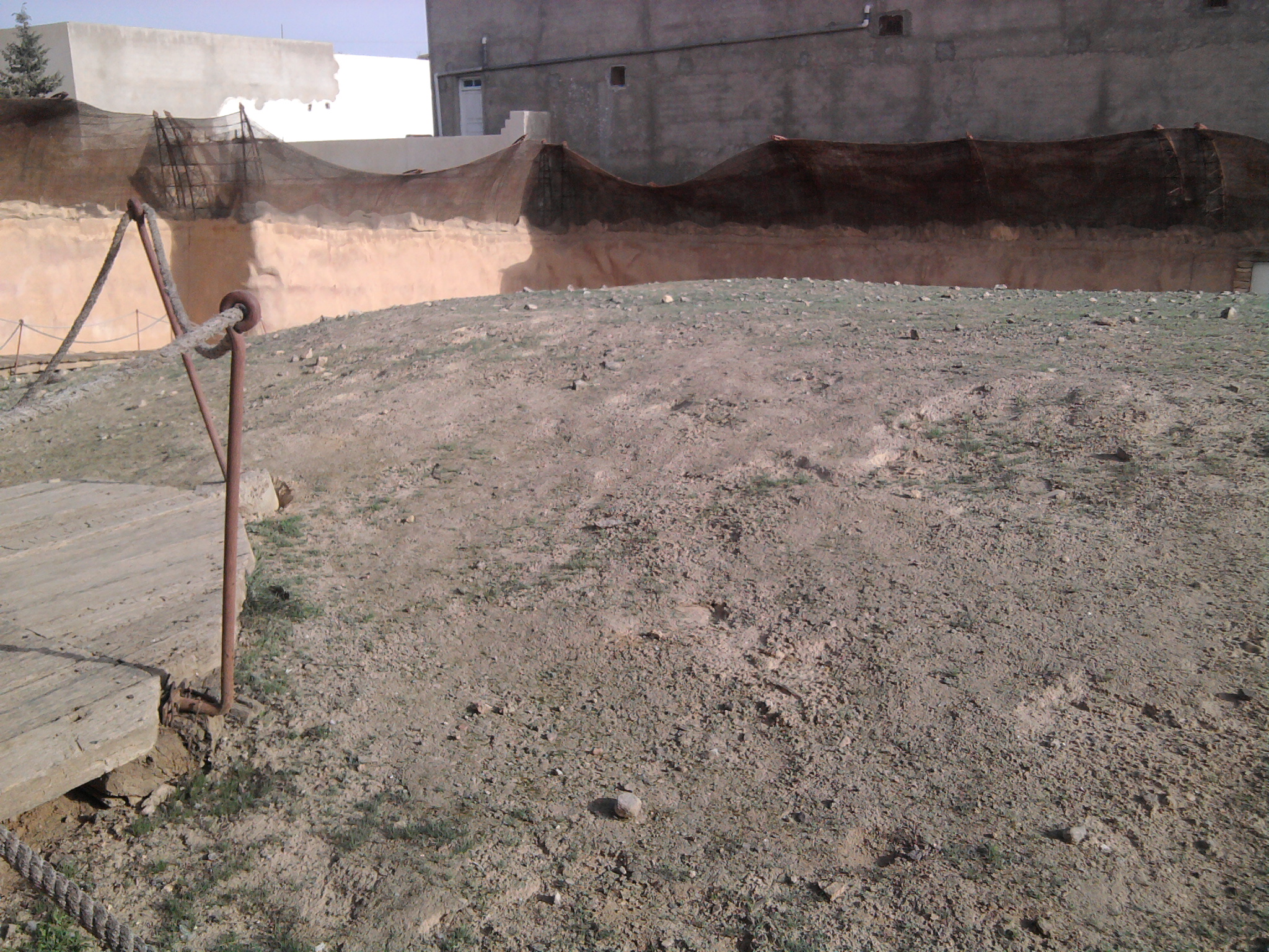 Tunisie, Escargotière Sidi Mansour à Gafsa